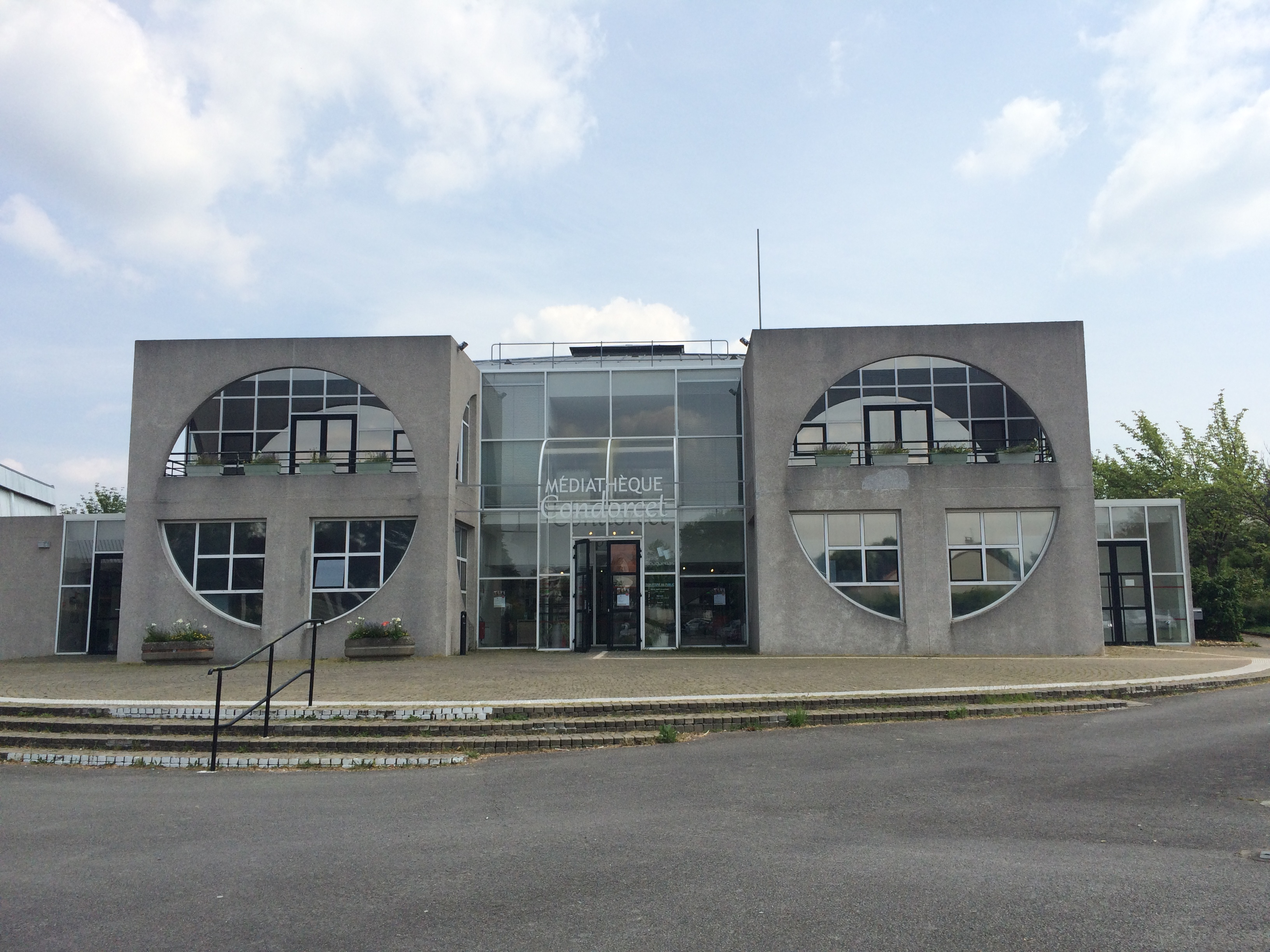 Vue de devant de la médiathèque Condorcet de Bouguenais